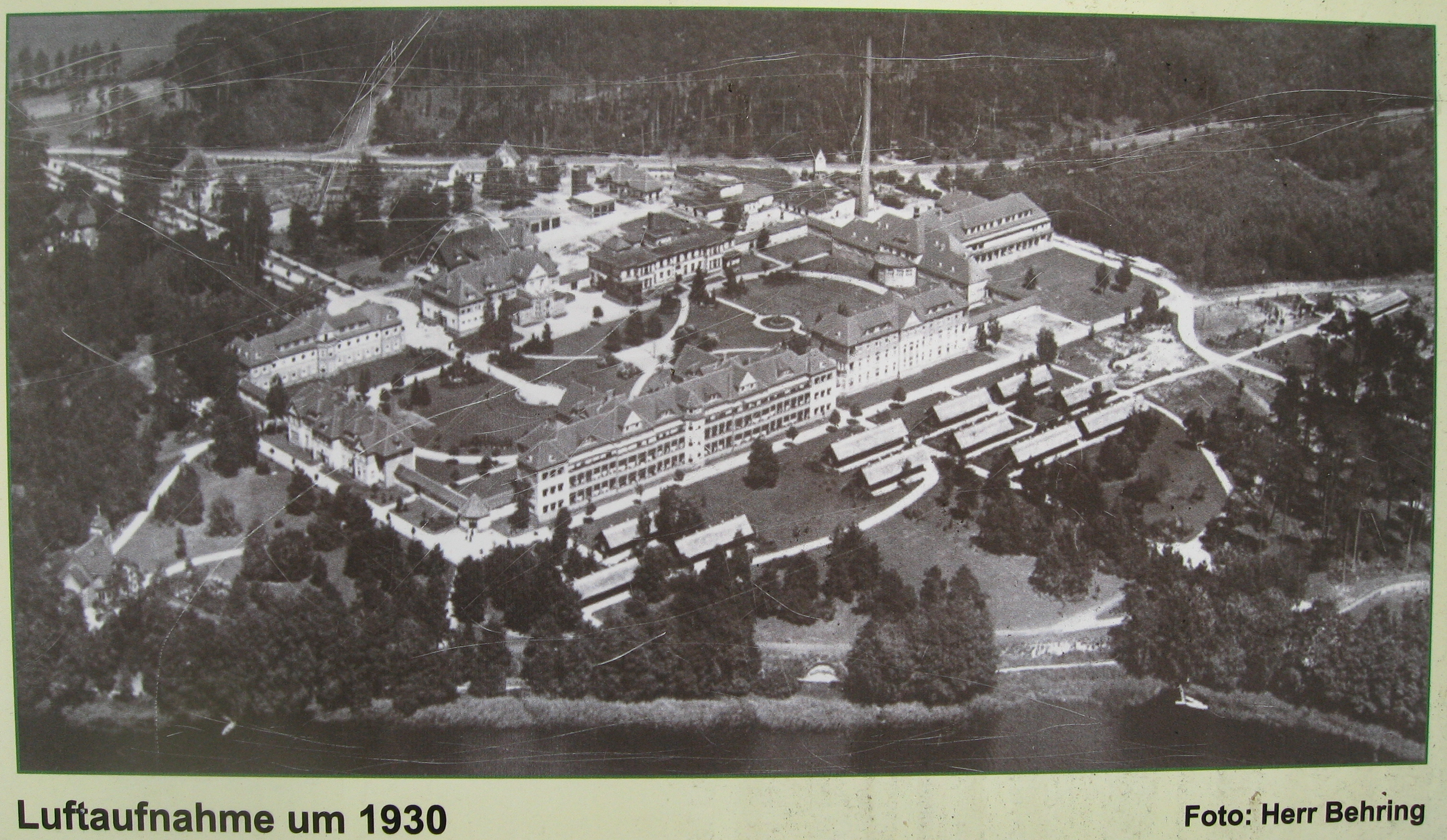 Historische Luftaufnahme der Heilstätte Grabowsee im Oranienburger Ortsteil Schmachtenhagen. Das Foto ist auf der Informationssäule auf diesem Bild enthalten, die an der Landstraße Schmachtenhagen–Bernöwe öffentlich zugänglich steht.